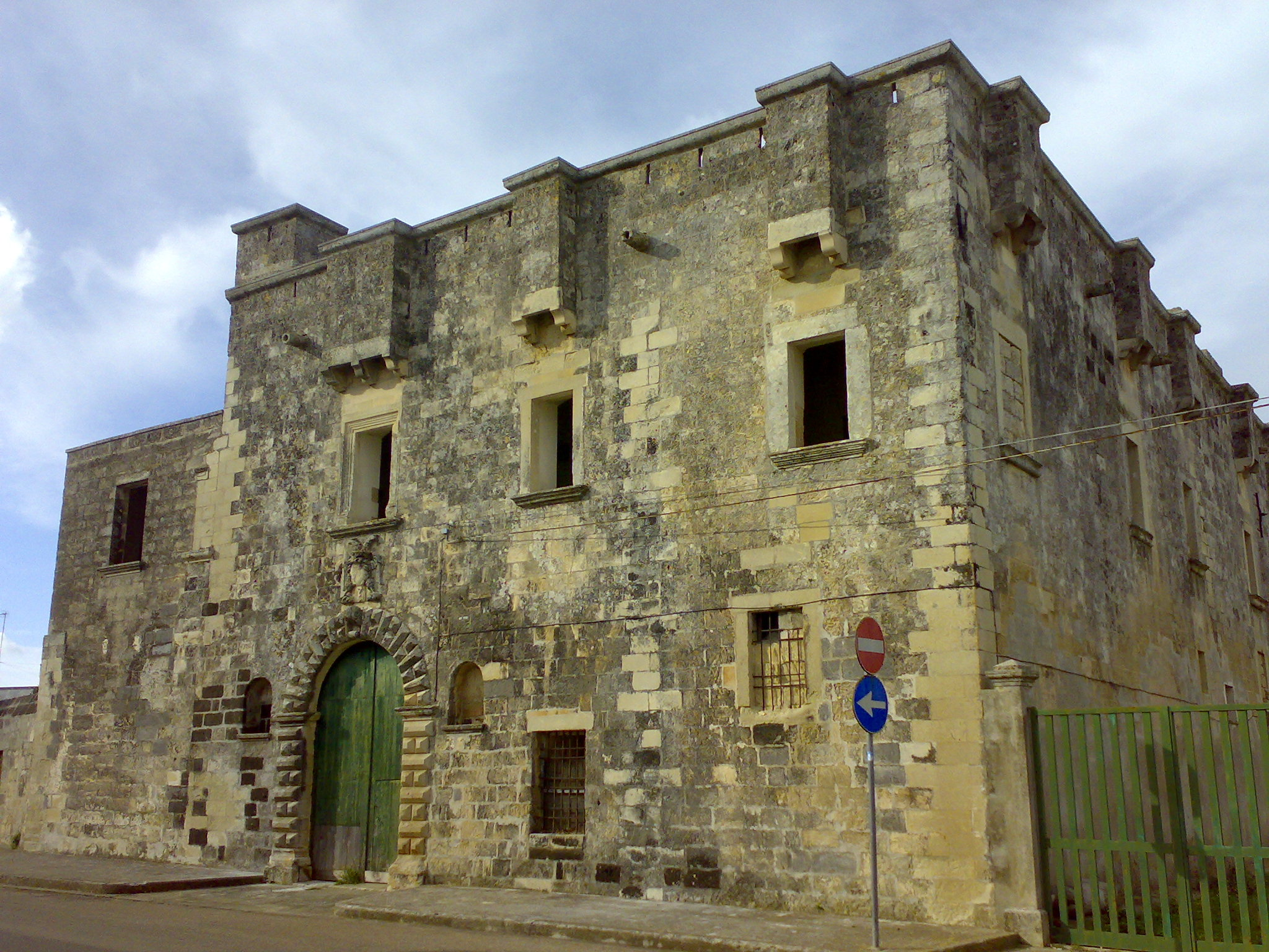 Minervino_di_Lecce_Palazzo Venturi, provincia di Lecce